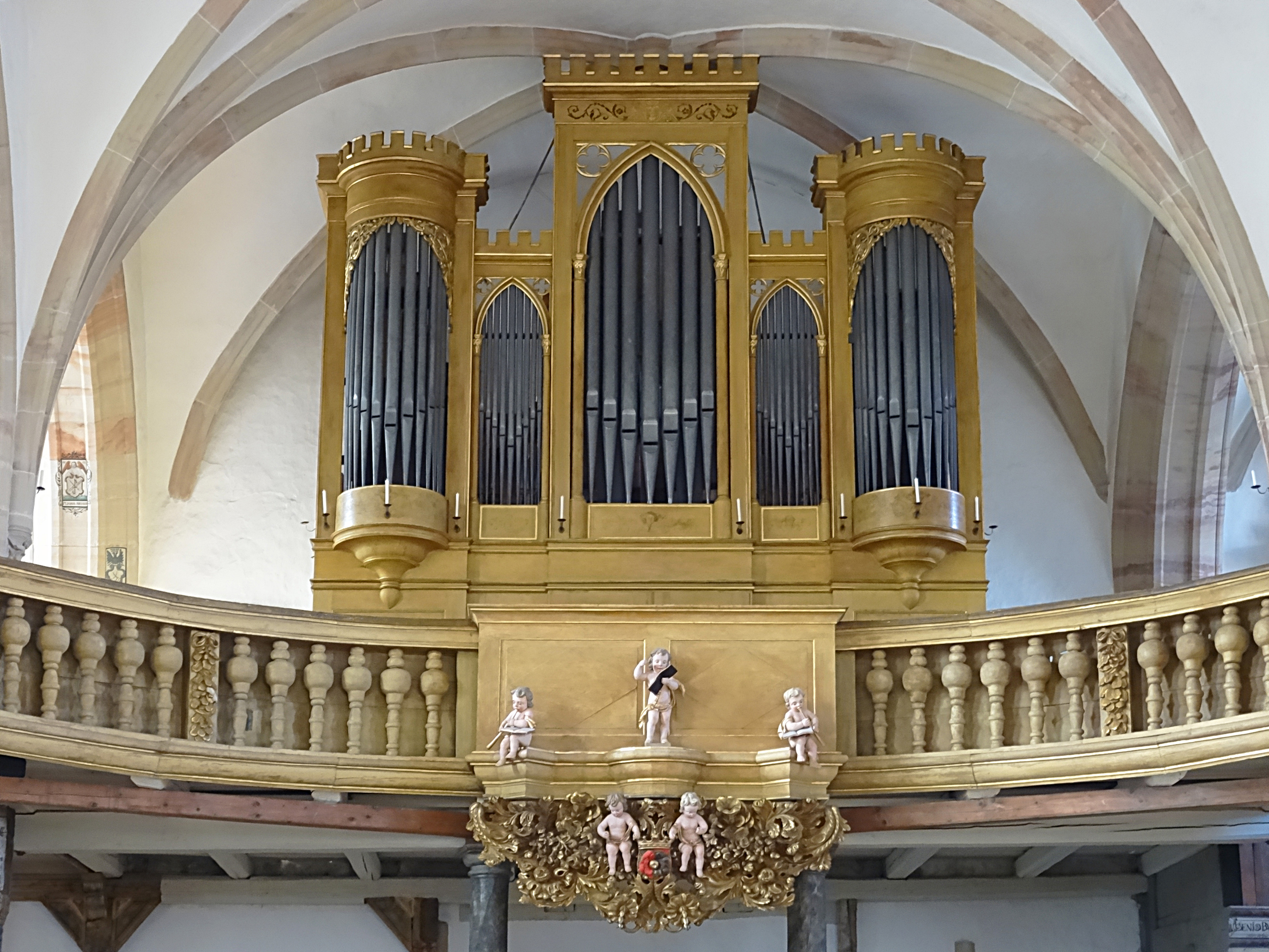 Orgel von Carl Gottfried Voigt aus Halberstadt (1866-67) in St. Stephani (Osterwieck)